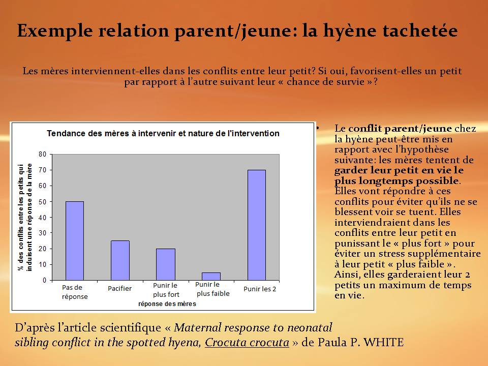 Ce document décrit l'exemple du conflit parent-jeune chez la Hyène tachetée.